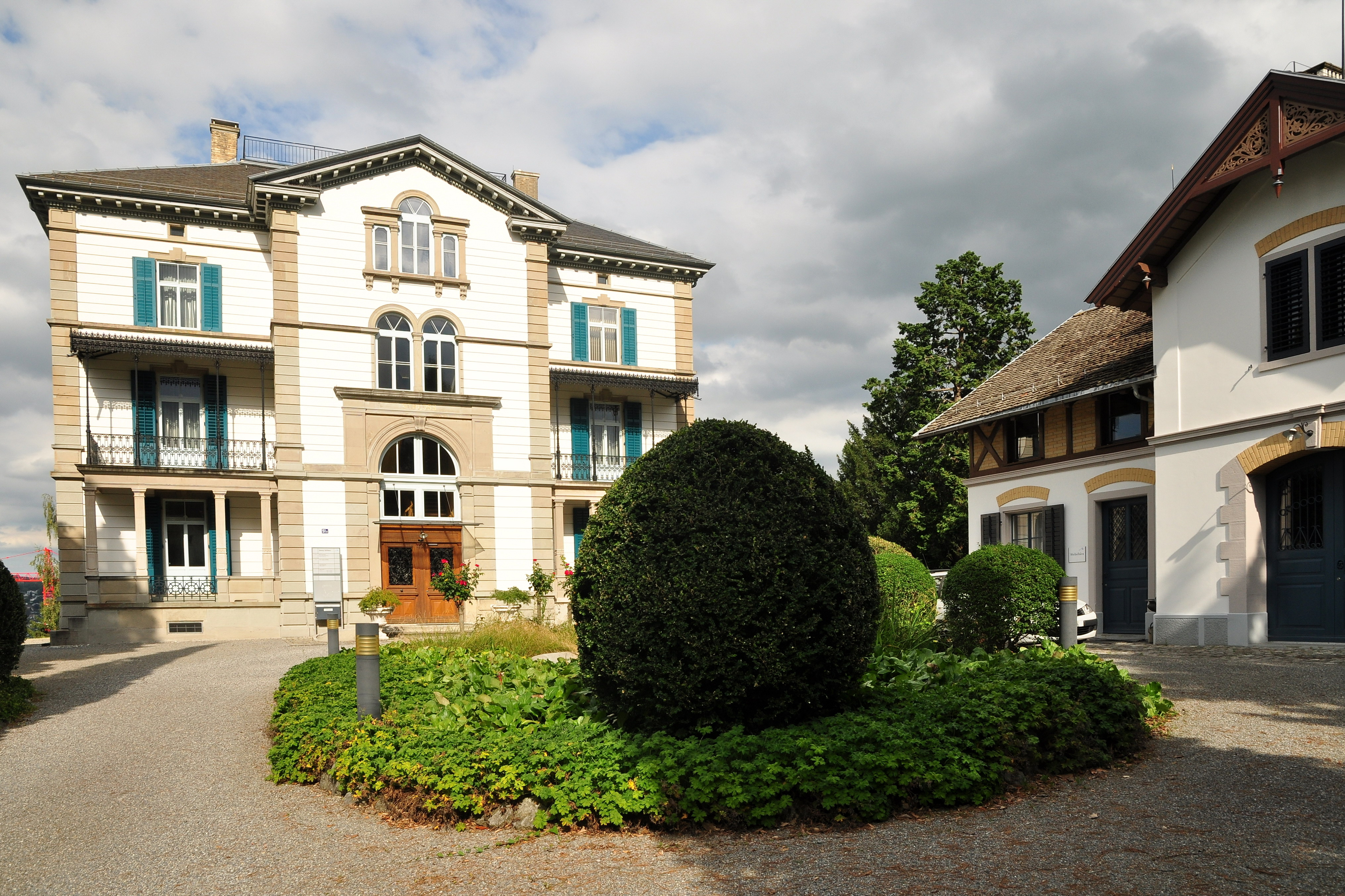 Sogenanntes «Jenny Schloss» mit Nebenbauten, Mühlebachstrasse 51b in Thalwil (Switzerland)